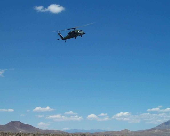 הצילום נלקח באישור מאדם הצילם את המסוק, באיזור המקיף את השטח הסגור סביב הבסיס באגם גרום. מדובר בעריכה של התמונה הנמצאת ב